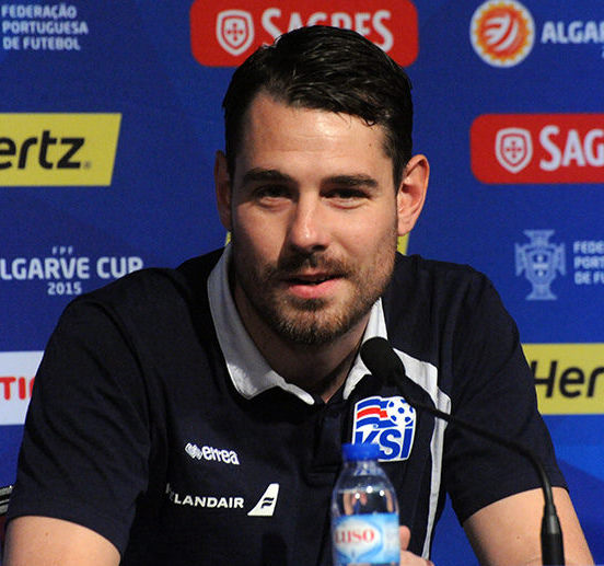 a_78_4747